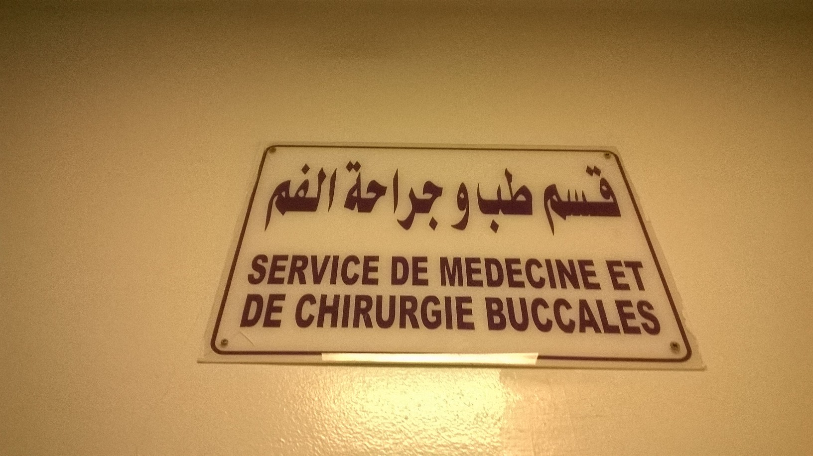 Clinique de médecine dentaire de Monastir, Monastir, Tunisie المصحة الاستشفائية الجامعية لطب الأسنان بالمنستير, المنستير، تونس